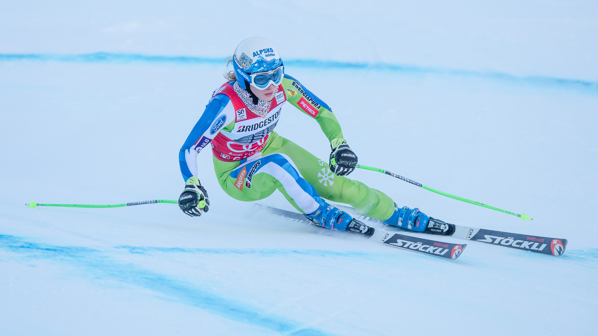 64. Kandahar Rennen,Audi FIS Ski Weltcup Garmisch-Partenkirchen,Damen Abfahrt,Ilka Stuhec,Ilka Štuhec,Kandahar,Ladies Downhill